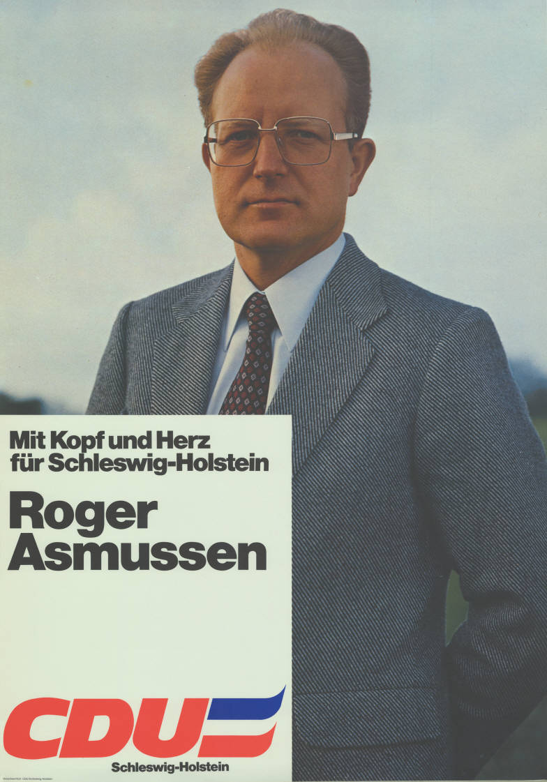 Mit Kopf und Herz für Schleswig-Holstein Roger Asmussen CDU Schleswig-Holstein Abbildung: Foto Plakatart: Kandidaten-/Personenplakat mit Porträt Auftraggeber: Verantw.: CDU Schleswig-Holstein Objekt-Signatur: 10-012 : 417 Bestand: Landtagswahlplakate Schleswig-Holstein (10-012) GliederungBestand10-18: Landtagswahlplakate Schleswig-Holstein (10-012) » Landtagswahl am 29.4.1979 » Kandidatenplakate Lizenz: KAS/ACDP 10-012 : 417 CC-BY-SA 3.0 DE